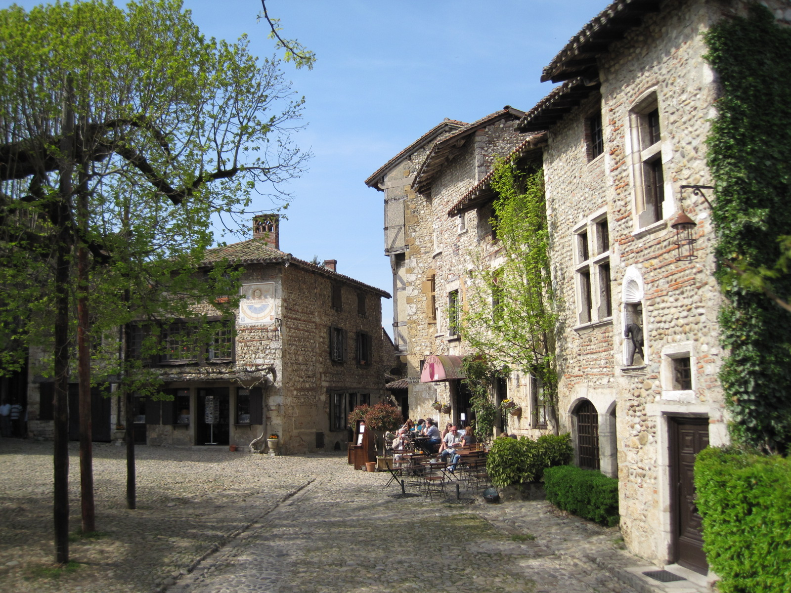 Pérouges